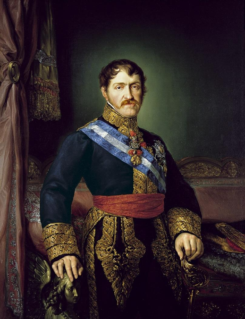 Retrato del infante de España Carlos María Isidro de Borbón (1788-1855), que fue hijo del rey Carlos IV de España y hermano de Fernando VII. Y a la muerte de este ultimo, disputó el trono de España a su sobrina, Isabel II, en el enfrentamiento conocido como la Primera Guerra Carlista, que finalizó en 1839 con el Abrazo de Vergara.